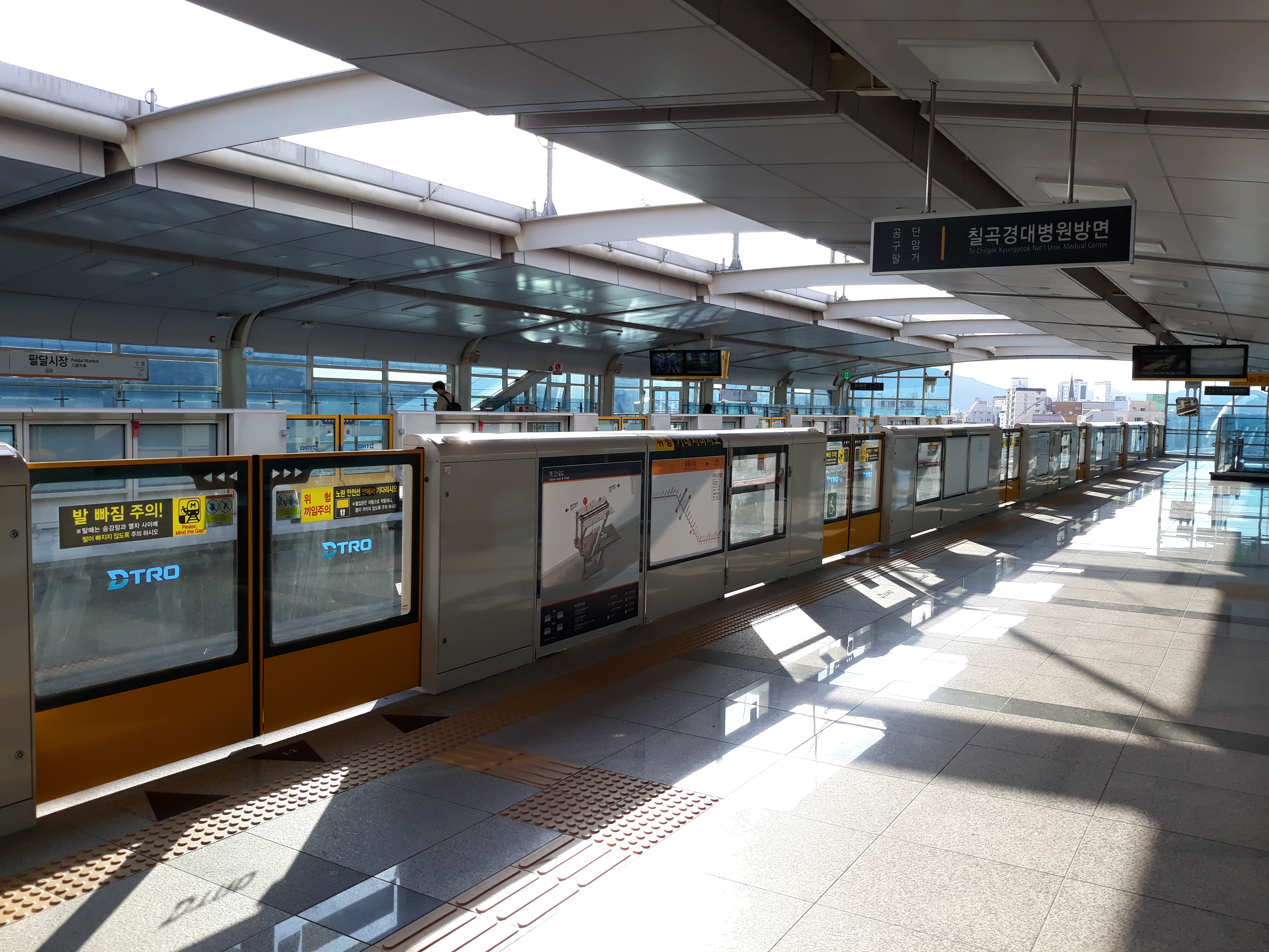 팔달시장역 승강장(칠곡경대병원 방면)